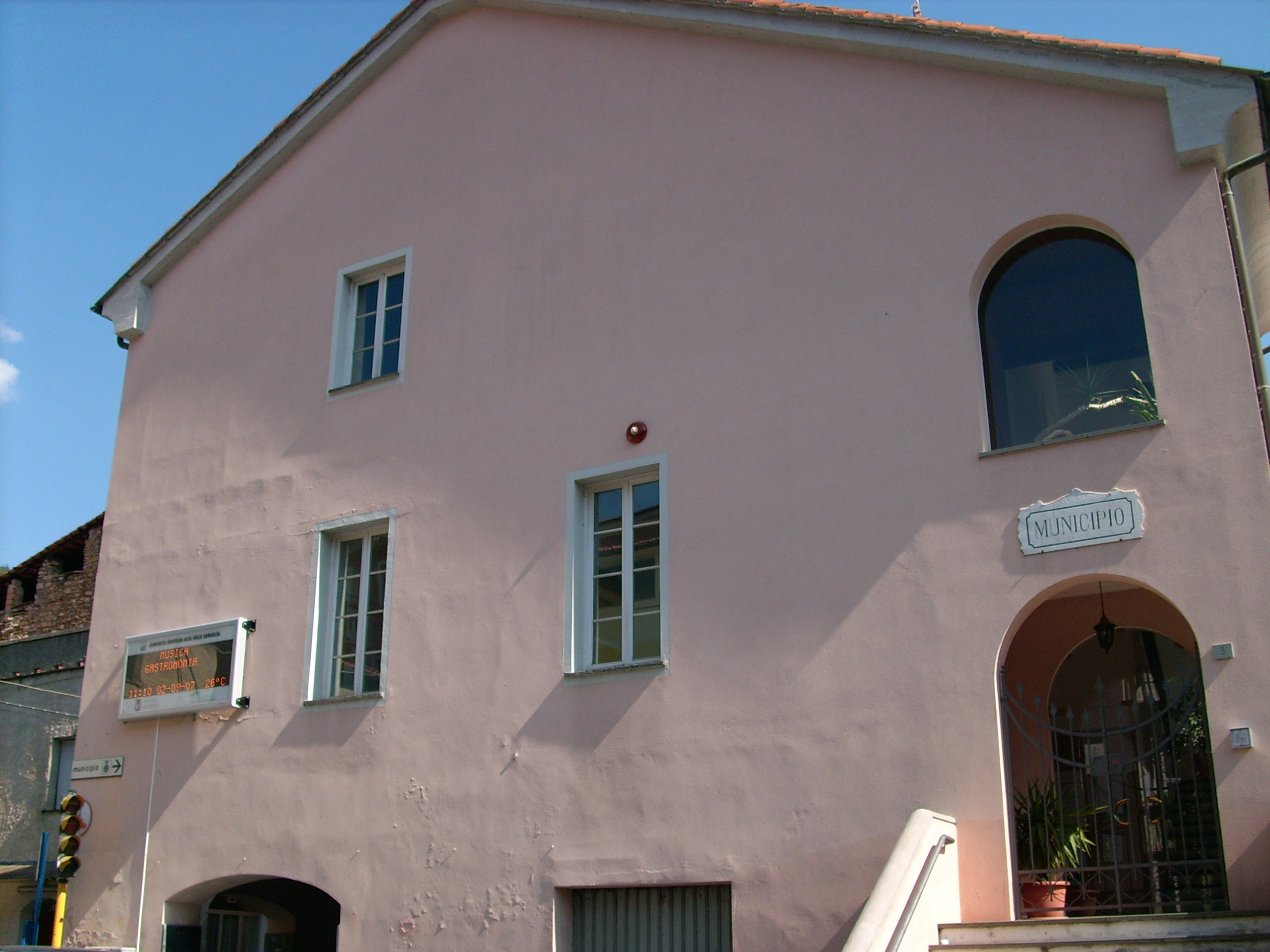 Municipio di Borghetto d'Arroscia, Liguria, Italia